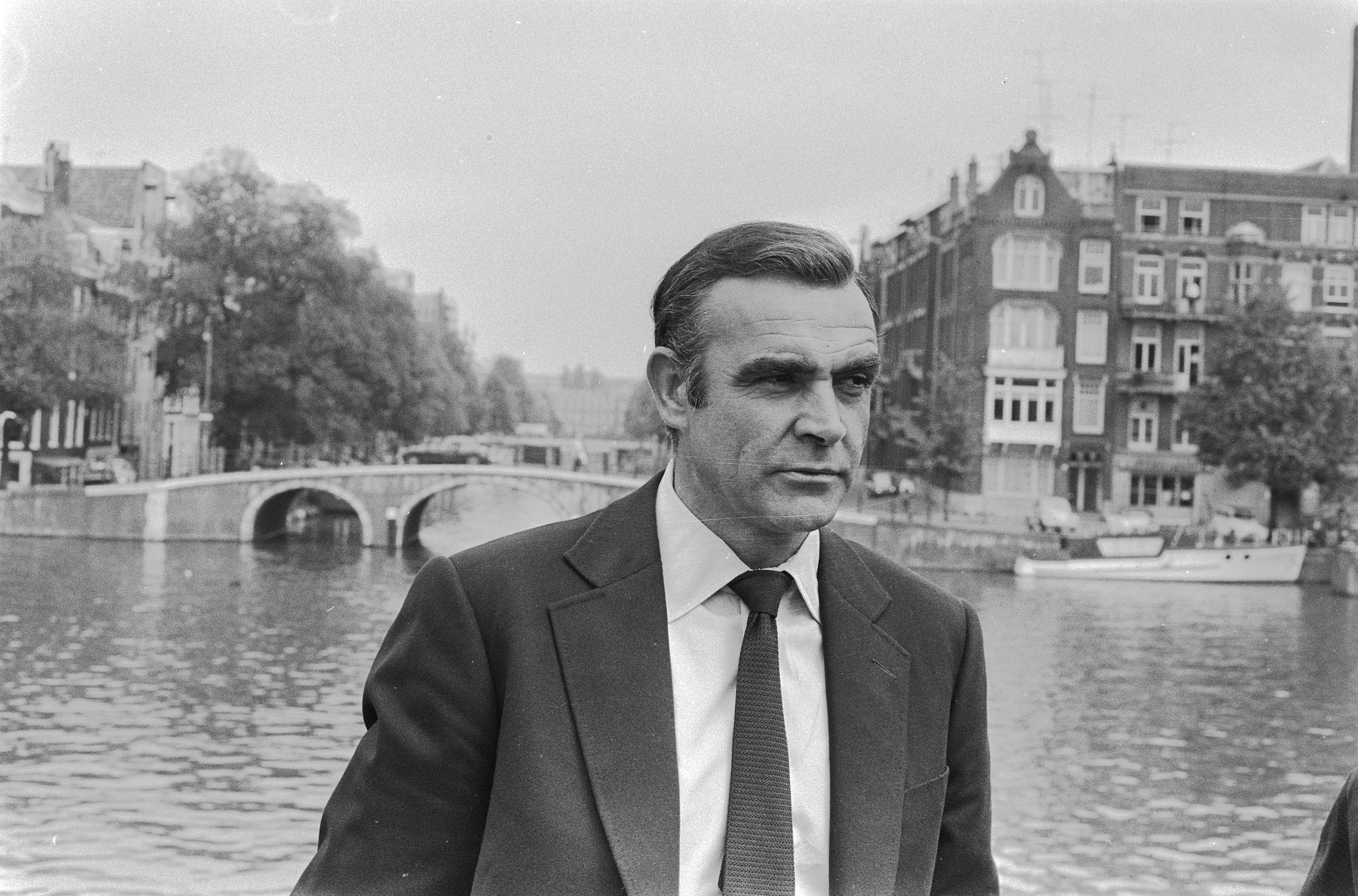 Collectie / Archief : Fotocollectie Anefo Reportage / Serie : [ onbekend ] Beschrijving : Opnamen in Amsterdam voor James Bond film "Diamonds are Forever" , Sean Connery bij de Amstel Datum : 3 juli 1971 Locatie : Amsterdam, Noord-Holland Trefwoorden : acteurs, films, filmsterren Persoonsnaam : Connery Sean Fotograaf : Mieremet, Rob / Anefo Auteursrechthebbende : Nationaal Archief Materiaalsoort : Negatief (zwart/wit) Nummer archiefinventaris : bekijk toegang 2.24.01.05 Bestanddeelnummer : 924-7001